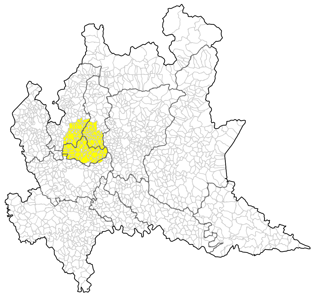 Area di localizzazione della Brianza (confini amministrativi aggiornati al 2014)